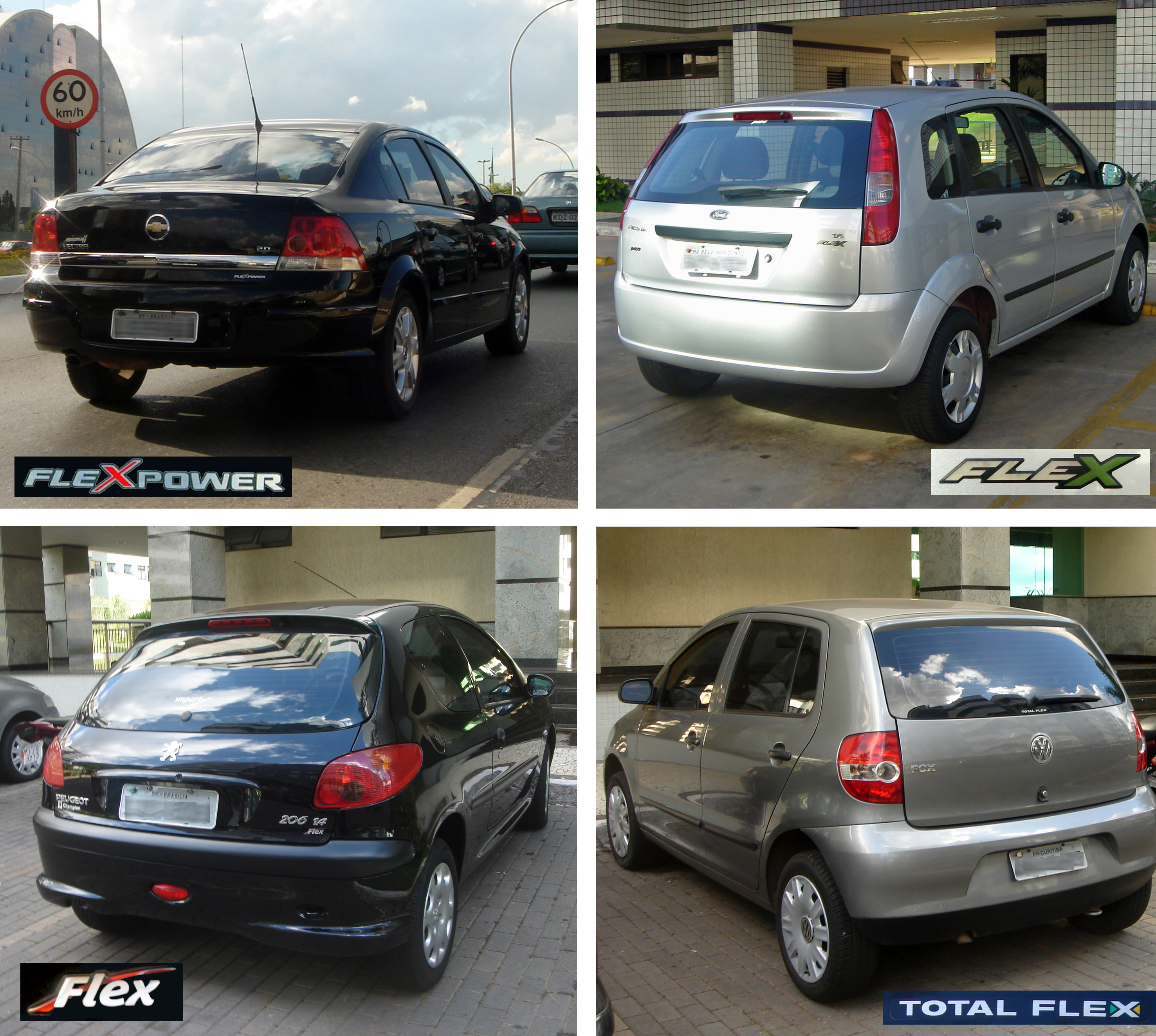 Typical Brazilian made dual-fuel (ethanol and gasoline) or full flex-fuel automobile models.